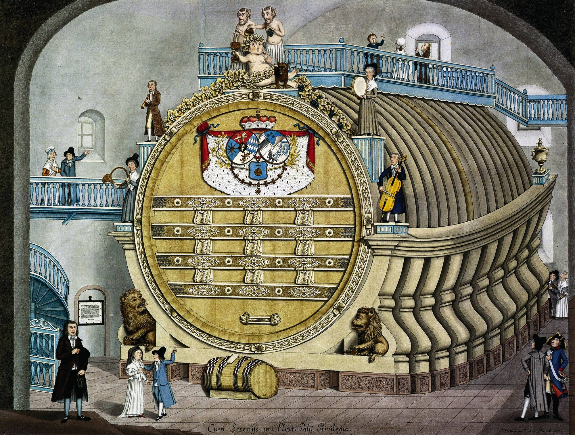 Das Große Heidelberger Fass (eventuell ein Entwurf?); Kurpfälzisches Museum Heidelberg